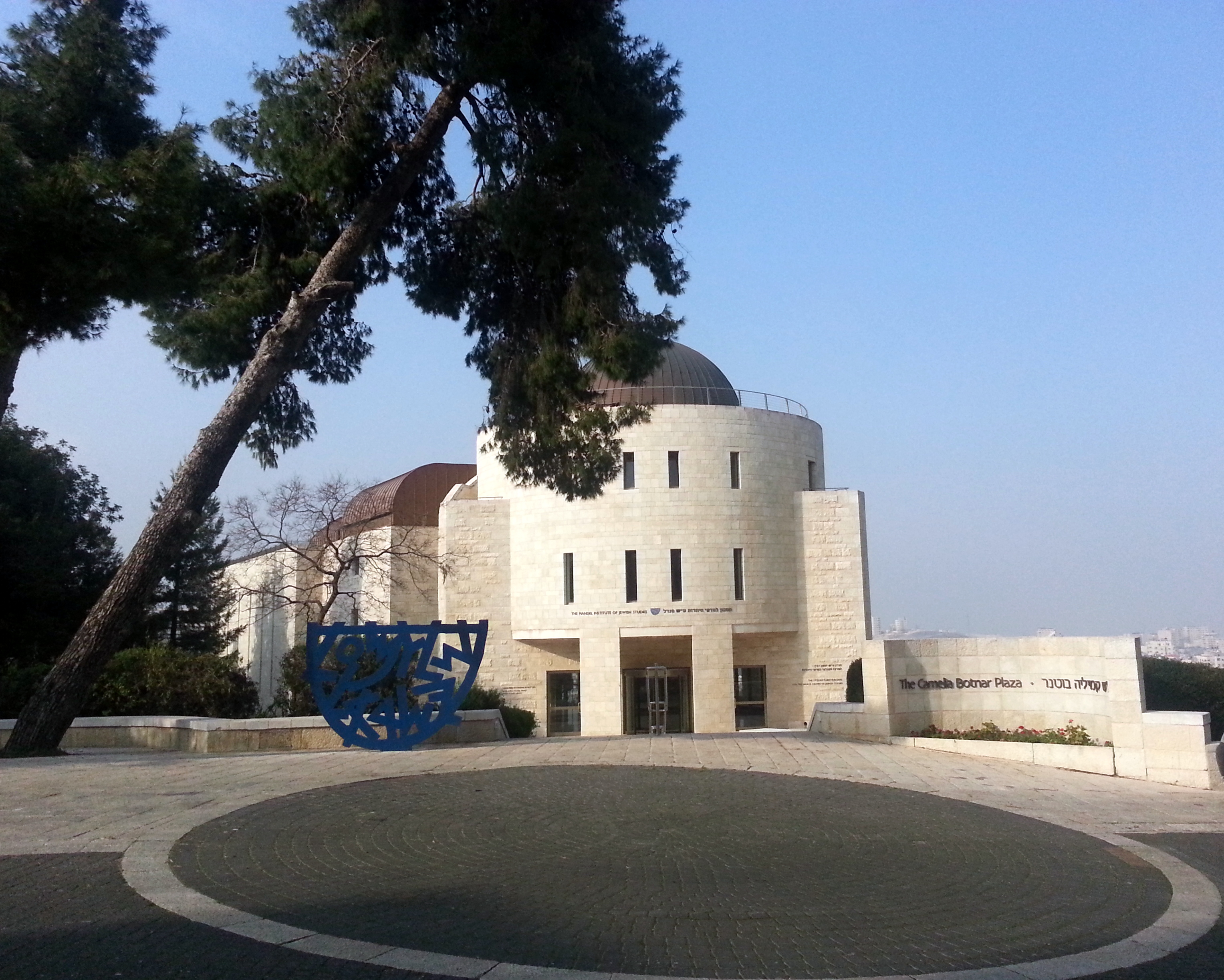 מראה בהר הצופים